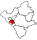 Ubicación del Distrito de Trujillo en La Provincia de Trujillo